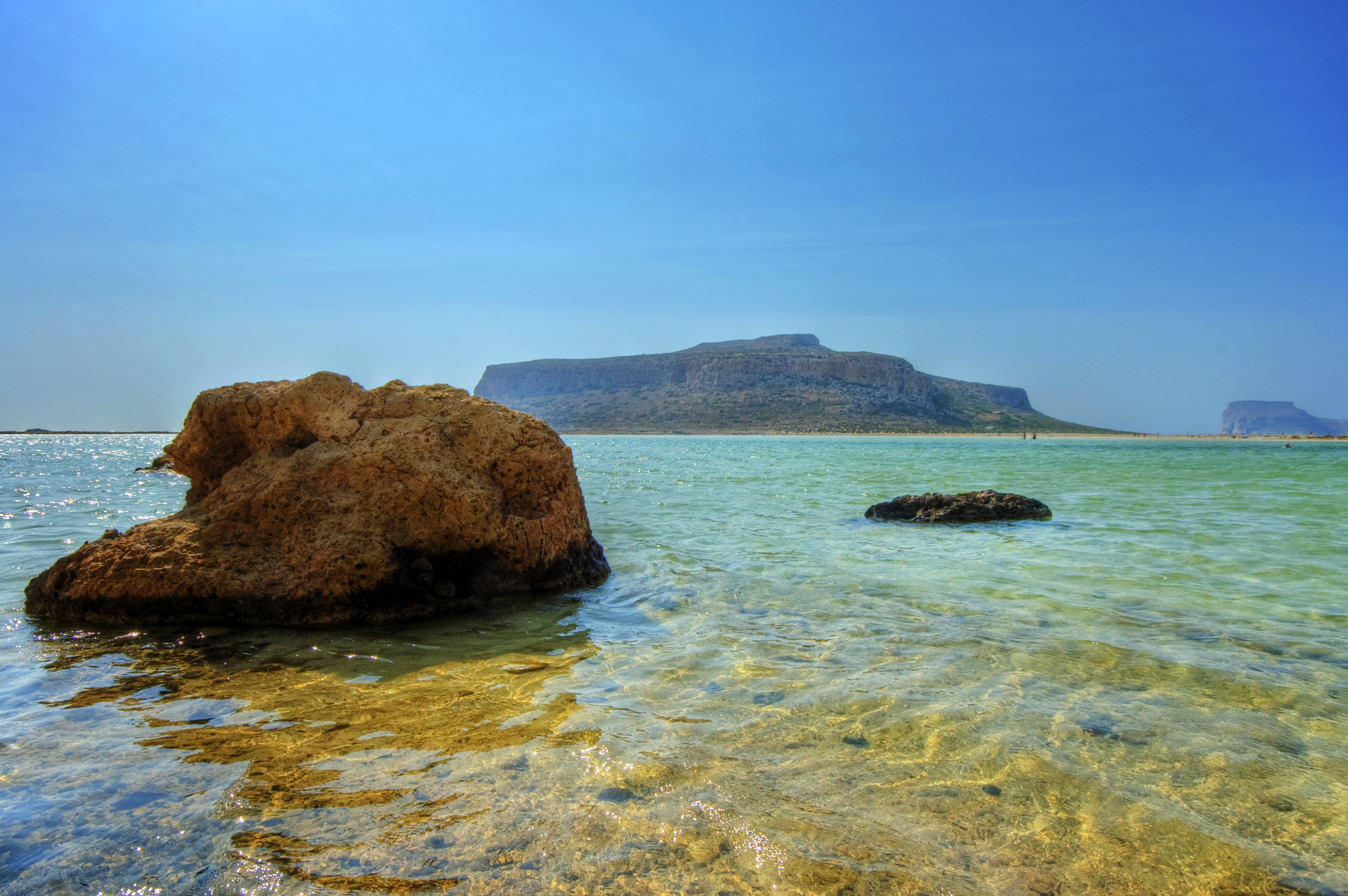 Balos, Crete